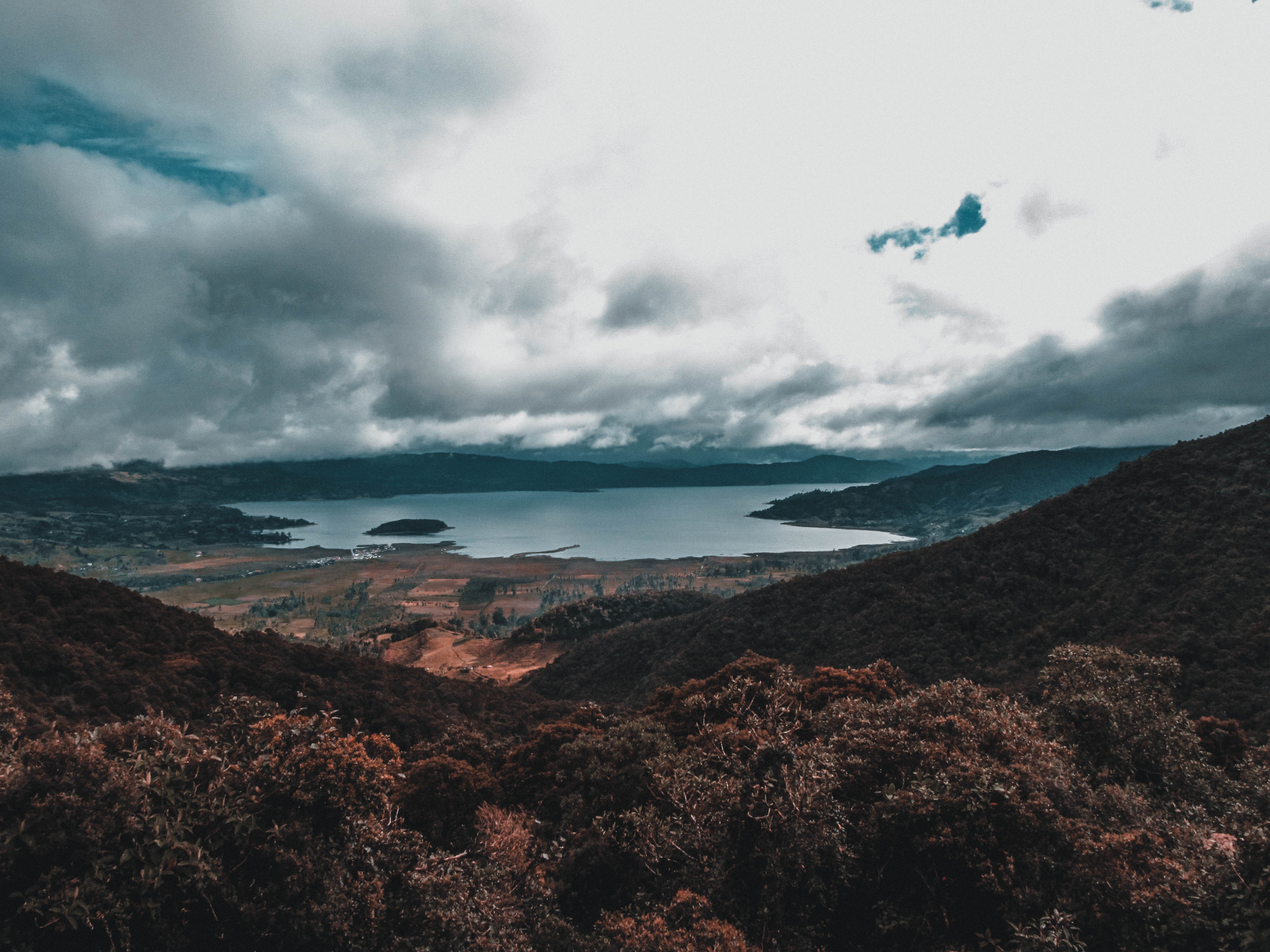 en el municipio de pasto, corregimiento del encano se puede observar en las lejanas la bella y resplandeciente luz que refleja la grande e imponente laguna de la cocha declarada como una de las lagunas mas grandes de Colombia. Esta fotografía fue tomada en un área protegida de Colombia con el código del RUNAP.